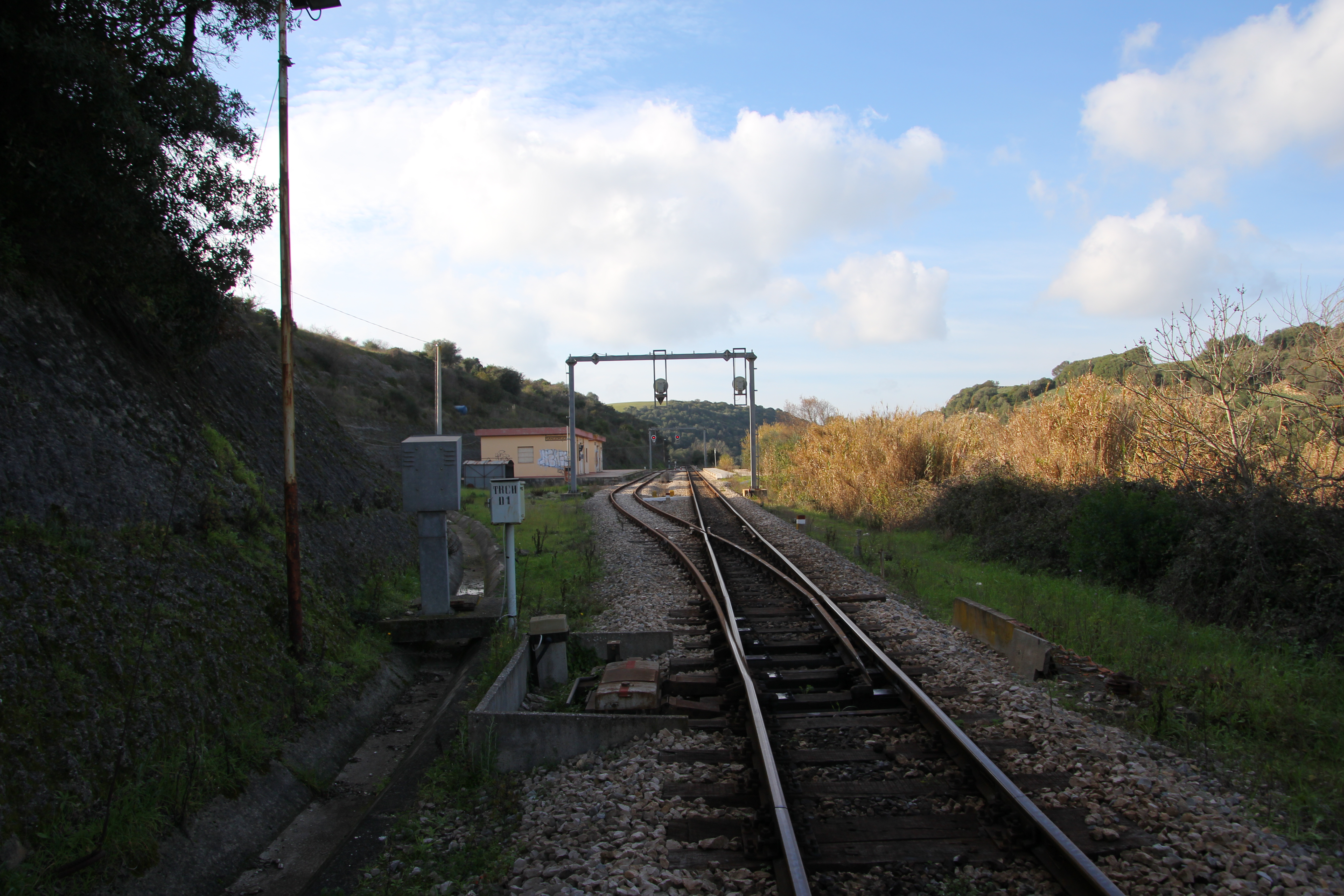 Usini - Stazione ferroviaria di San Giorgio